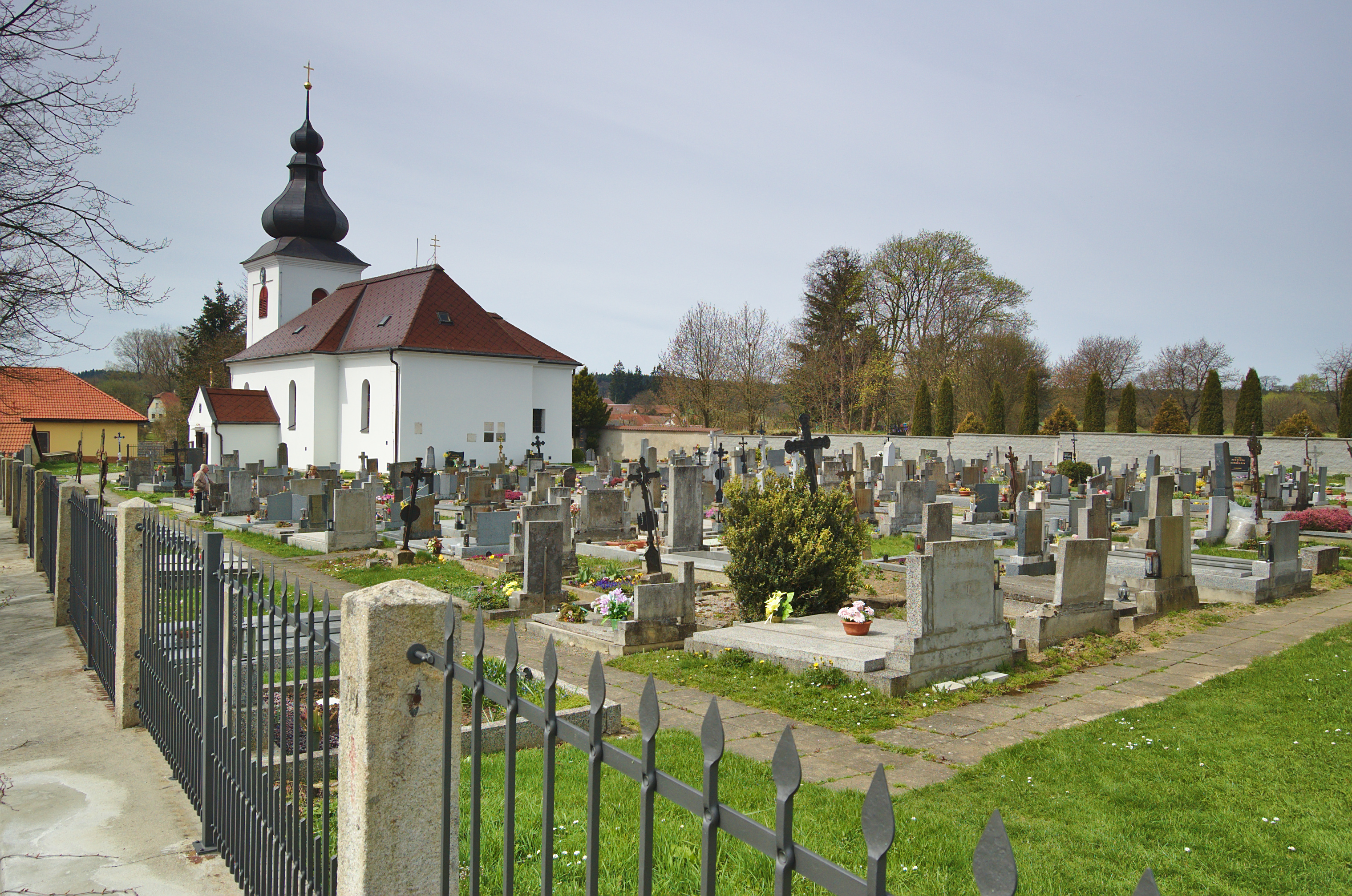 Kostel svatého Jana Evangelisty, Těmice, okres Pelhřimov Project: Fotíme Česko